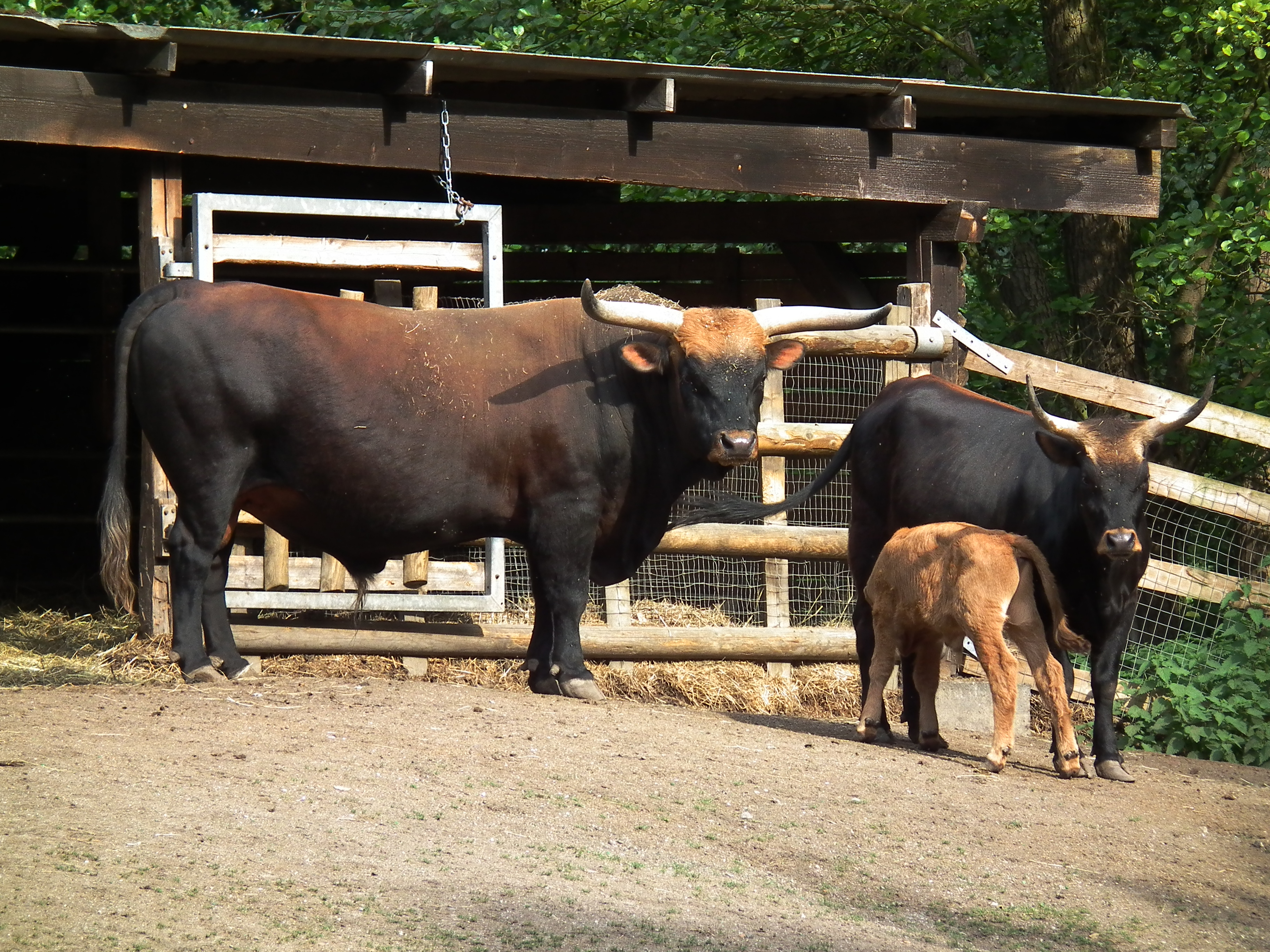 Abbildzüchtung des Auerochsen (Bos primigenius) im Wildpark Rheingönheim (Rheinland-Pfalz, Deutschland)